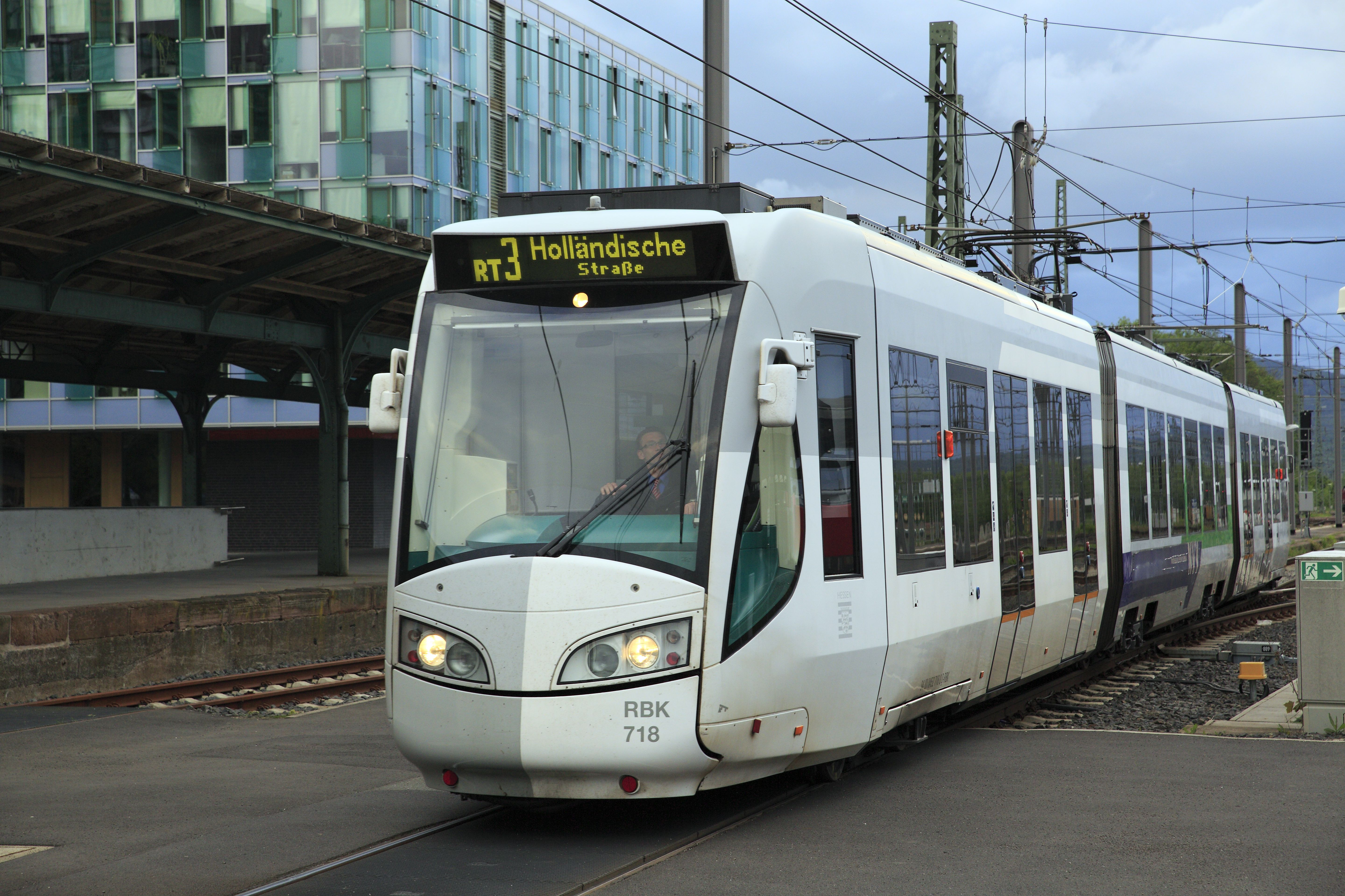 Zug der Linie RT 3 von Hofgeismar-Hümme nach Kassel, Holländische Straße im Gleichstromteil des Bahnhofs Kassel Hbf. Der Triebwagen passiert den Dienstübergang vor dem Beginn der Neigung in Richtung Tunnel mit den Bahnsteigen.